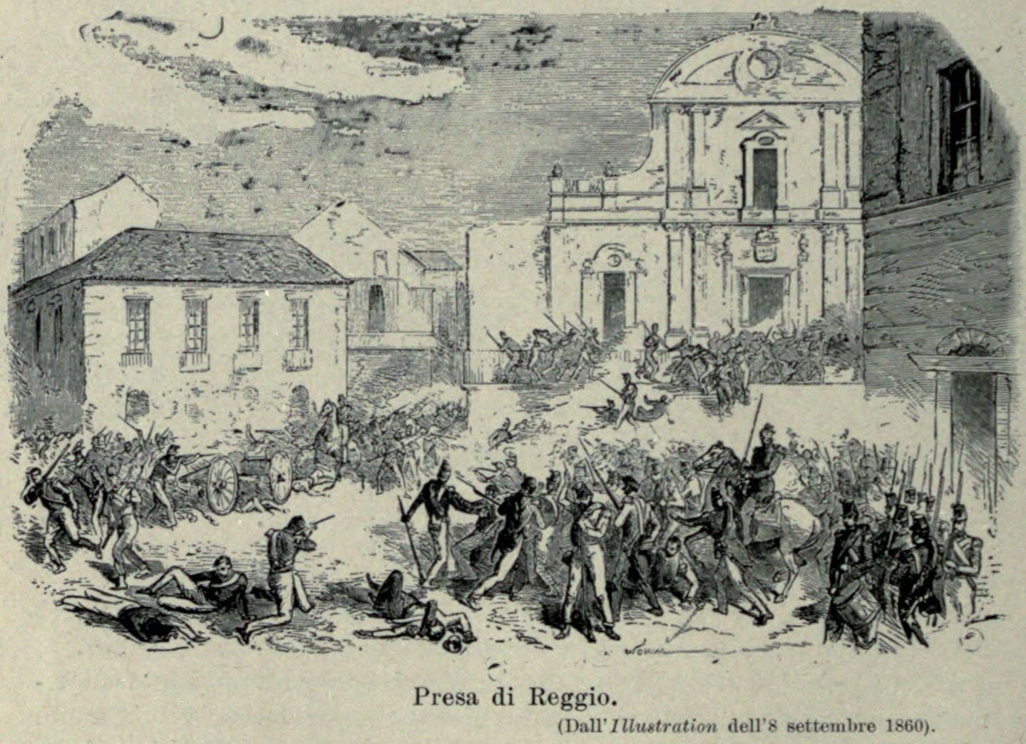 Presa di Reggio.